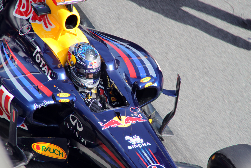 Mr.Vettel.